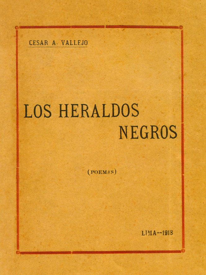 Portada de la primera edición del poemario "Los heraldos negros" de César Vallejo